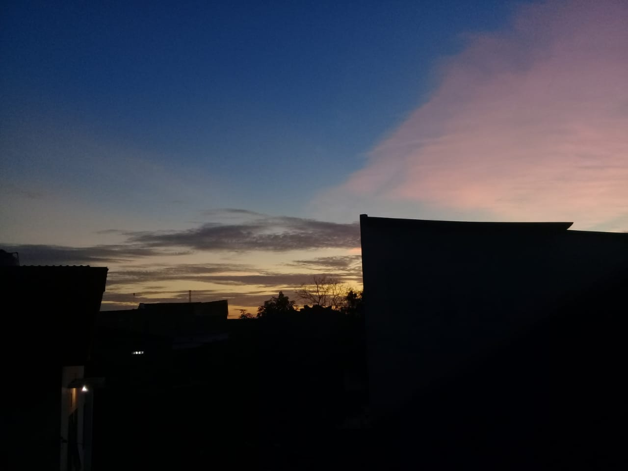 Jawa: Kaendahan ing langit sore saka tingkat telu ana ing Kos Wisma Andri 1 dalan Surya 3 Jebres Surakarta. kaendahan kasebut nggambaraké wayah sore.